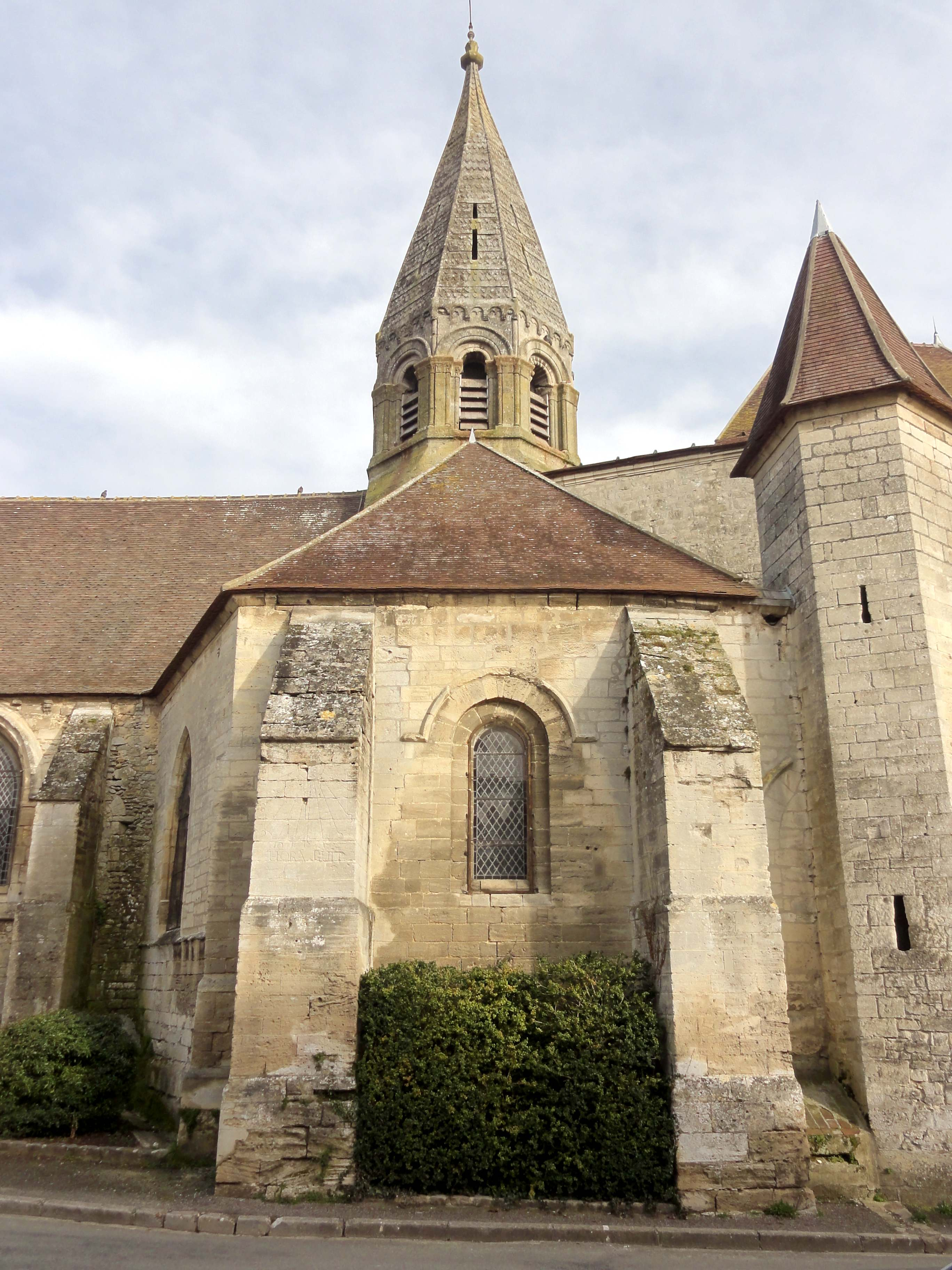 Voir titre.